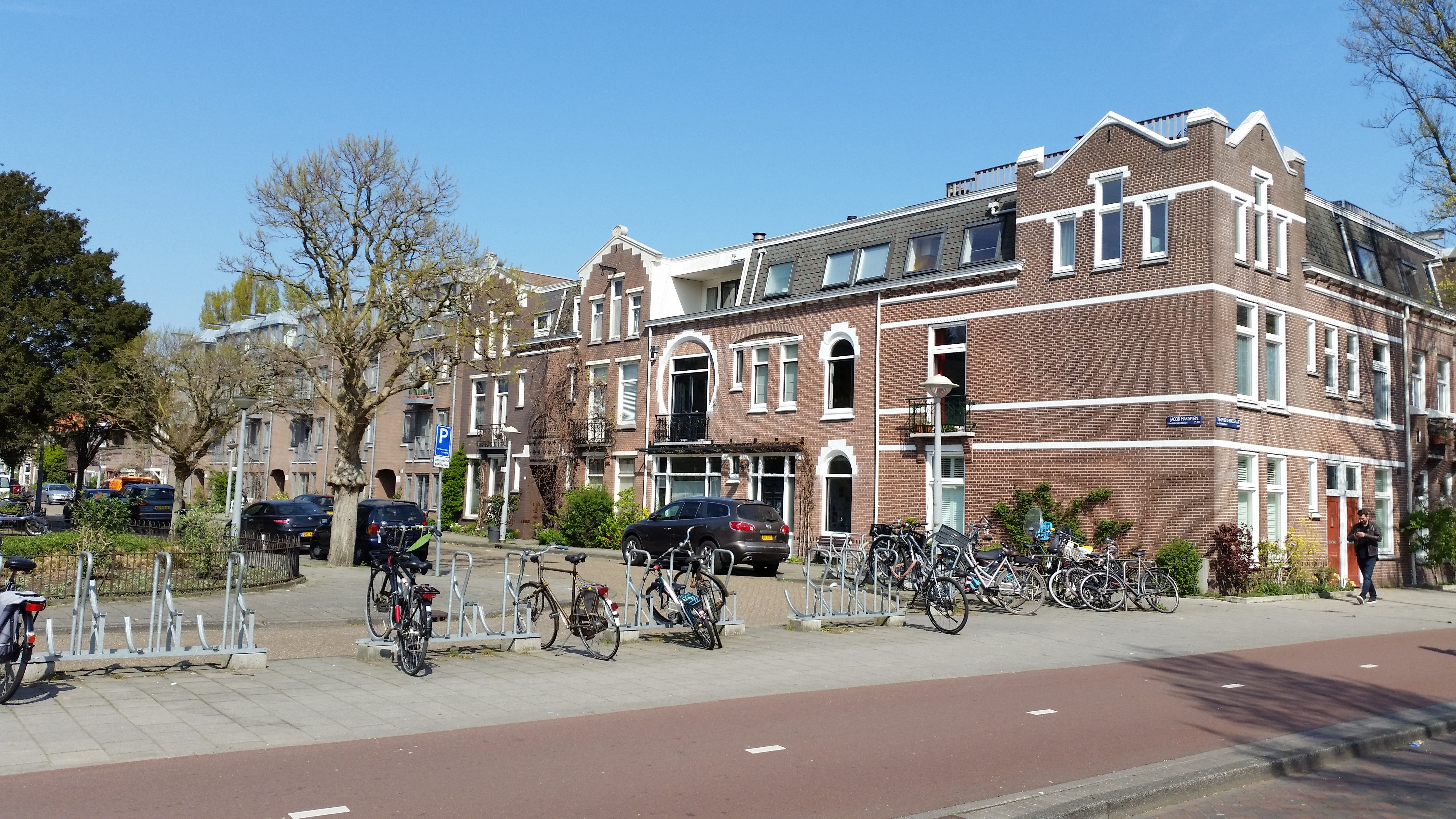 Jacob Marisplein, Amsterdam 1 tm 25 van links naar rechts